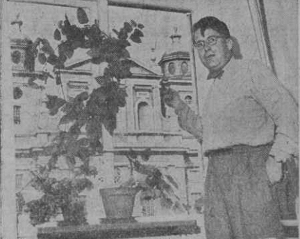 Stadsarkitekt Nils Carlgren i ämbetsrummet i Kalmar